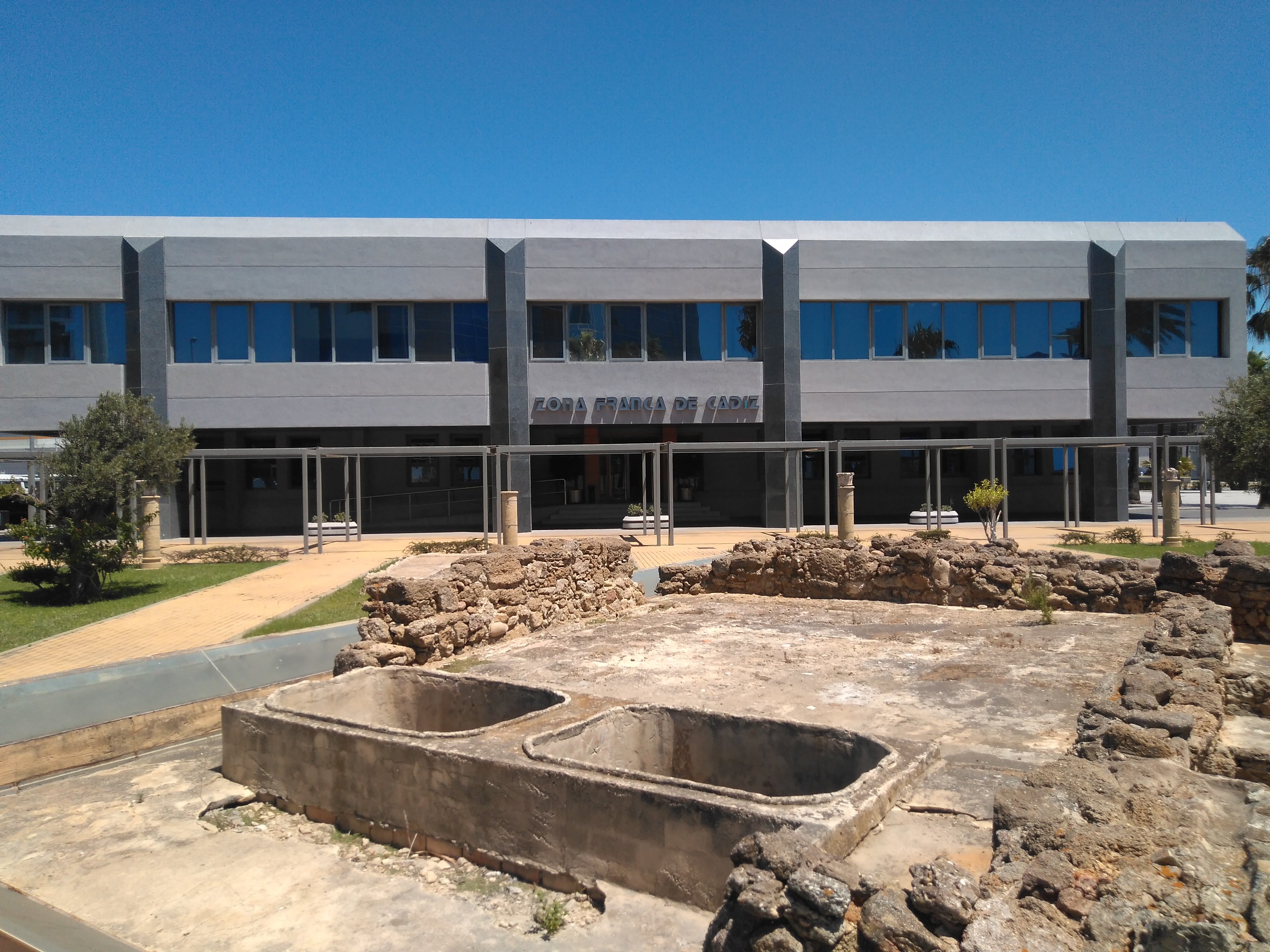 Edificio de la zona franca y Casa romana (EPQ-37 según el Catálogo de Patrimonio Arqueológico del PGOU de Cádiz)